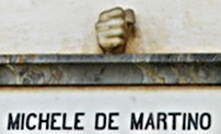 particolare del pugno chiuso su lapide (simbolo massonico)